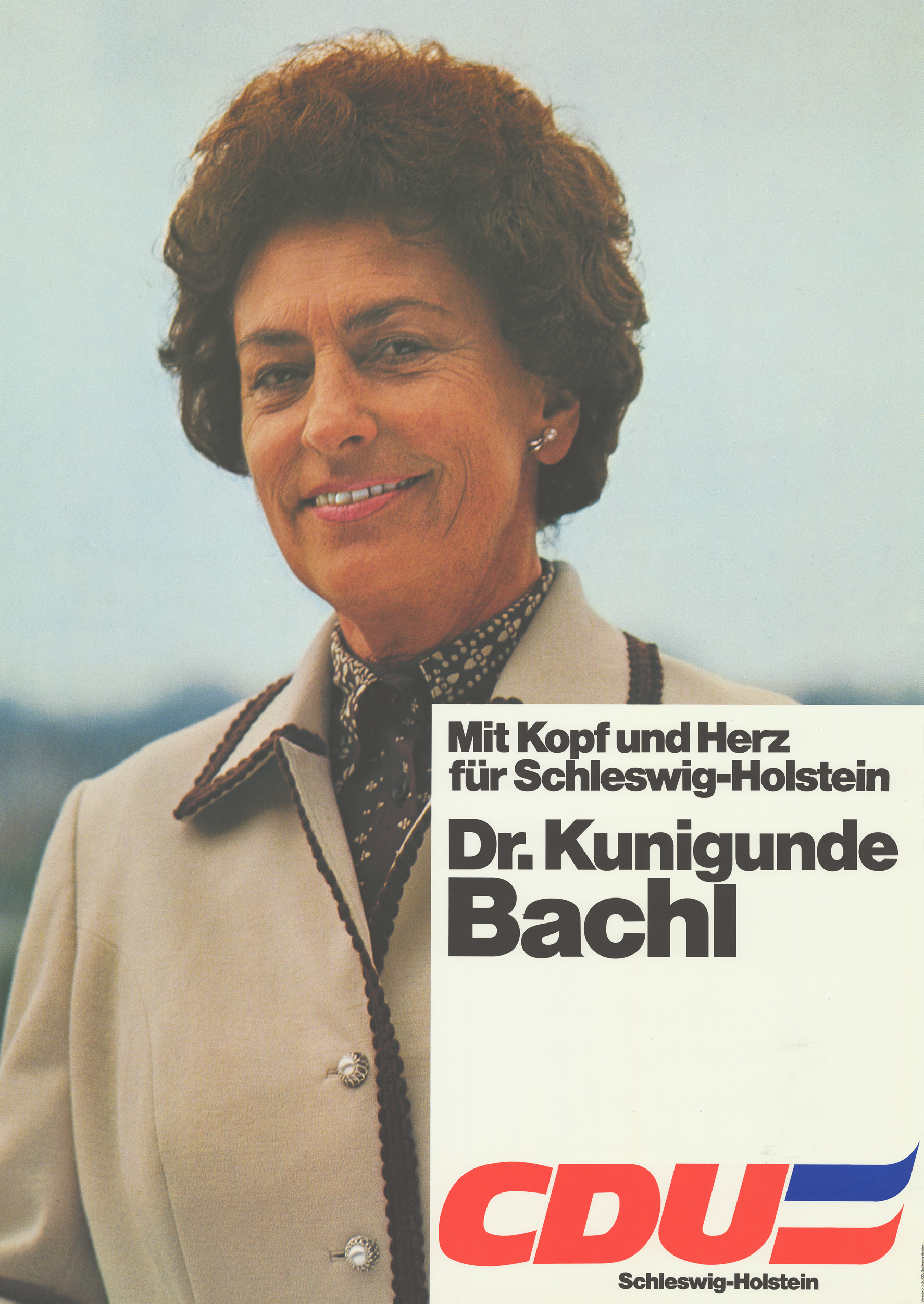 Mit Kopf und Herz für Schleswig-Holstein Dr. Kunigunde Bachl CDU Schleswig-HolsteinAbbildung:FotoPlakatart:Kandidaten-/Personenplakat mit PorträtAuftraggeber:Verantw.: CDU Schleswig-Holstein Objekt-Signatur:10-012 : 416Bestand:Landtagswahlplakate Schleswig-Holstein (10-012)GliederungBestand10-18:Landtagswahlplakate Schleswig-Holstein (10-012) » Landtagswahl am 29.4.1979 » KandidatenplakateLizenz:KAS/ACDP 10-012 : 416 CC-BY-SA 3.0 DE